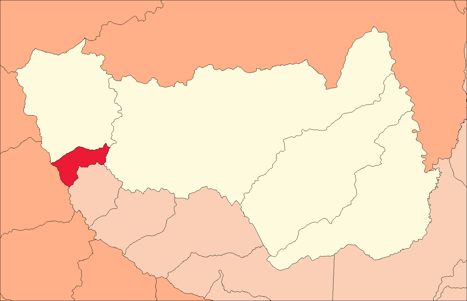 Área del distrito de San Buenaventura en la provincia de Marañón.